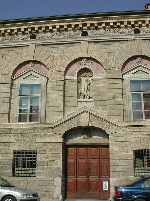 Tor der Casa di Giulio Romano in Mantova Source: photo uploaded by User:RicciSpeziari. Photographer: Riccardo Speziari